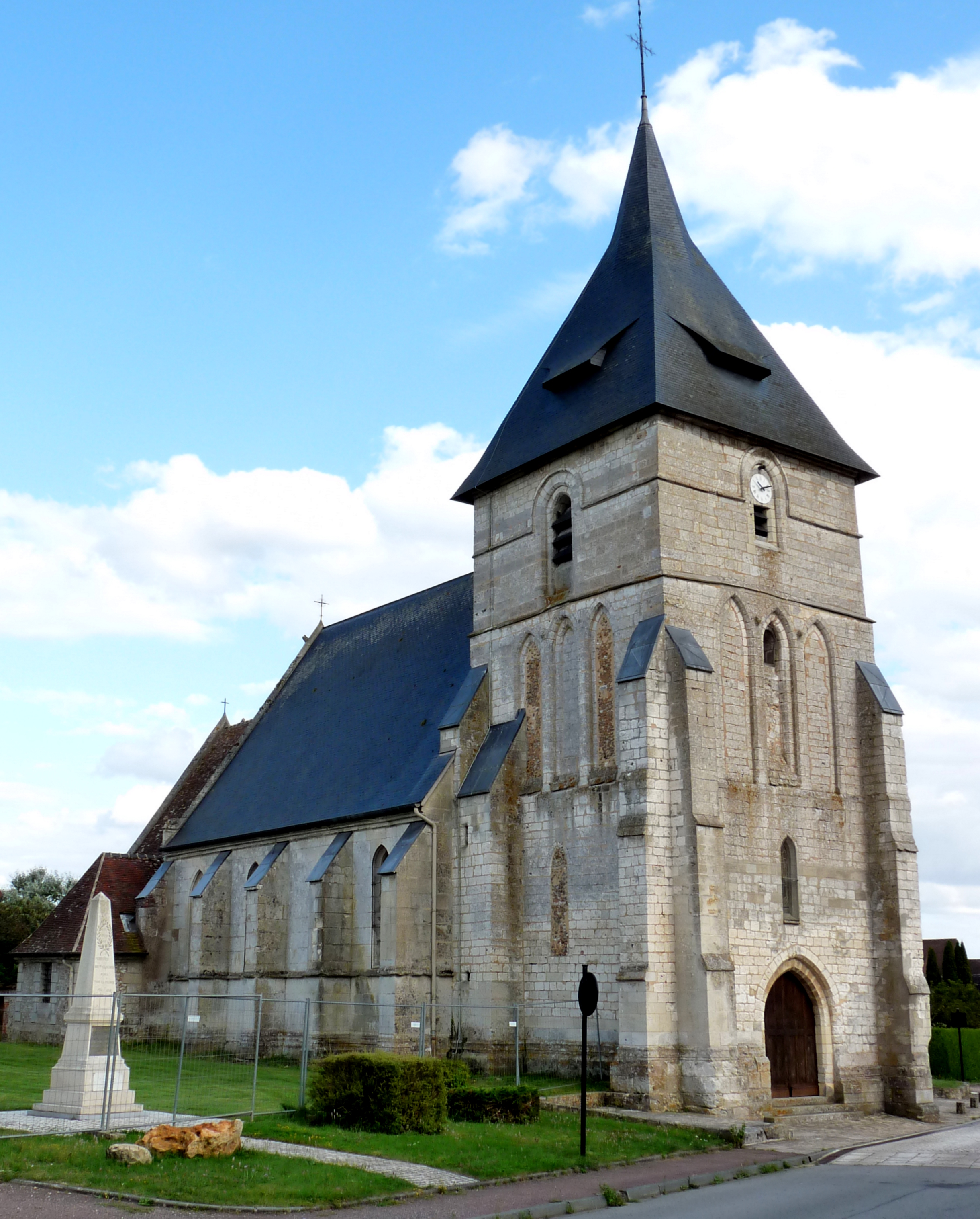 Église Sainte-Christine de Ferrières-Haut-Clocher